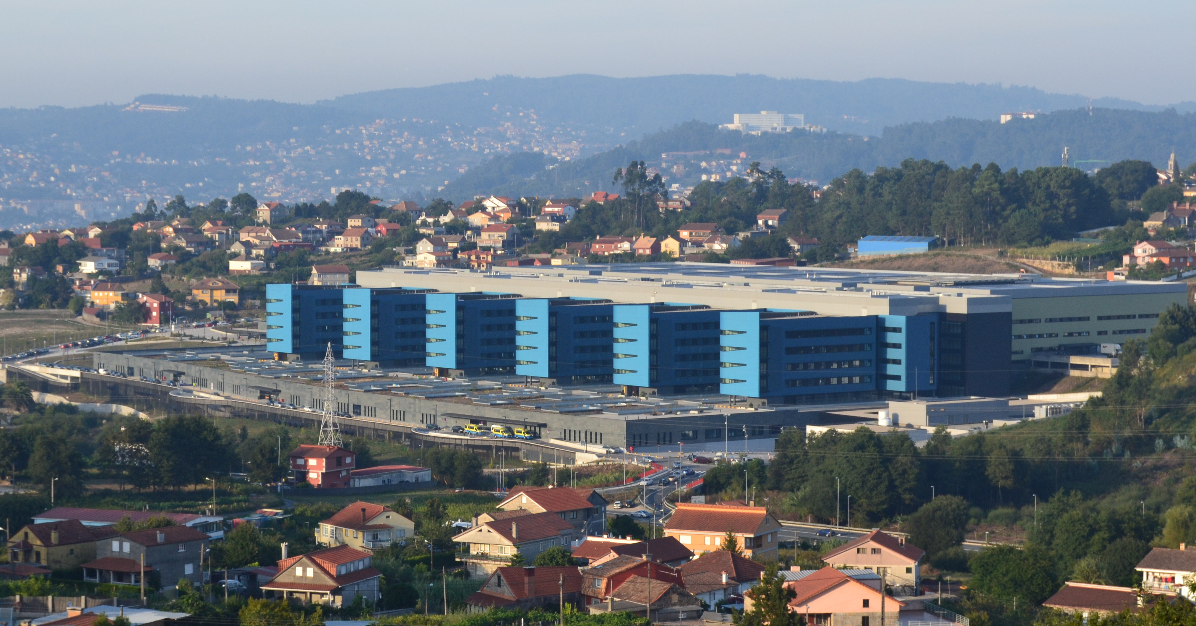 Hospital Álvaro Cunqueiro visto dende Valadares